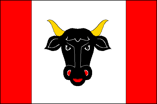 vlajka, Turovice, okres Přerov